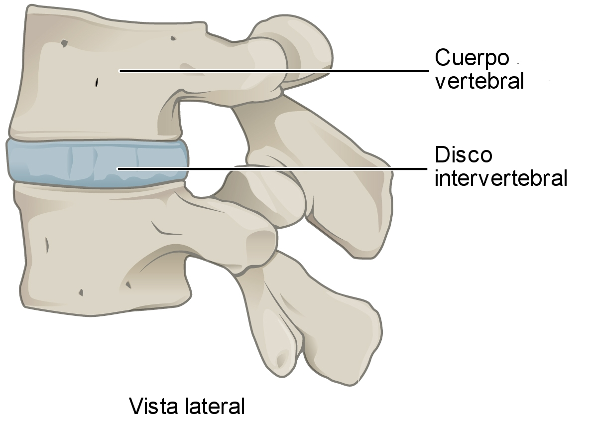 Vision lateral de la columna vertebral en la que son visibles dos cuerpos vertebrales y el disco intervertebral